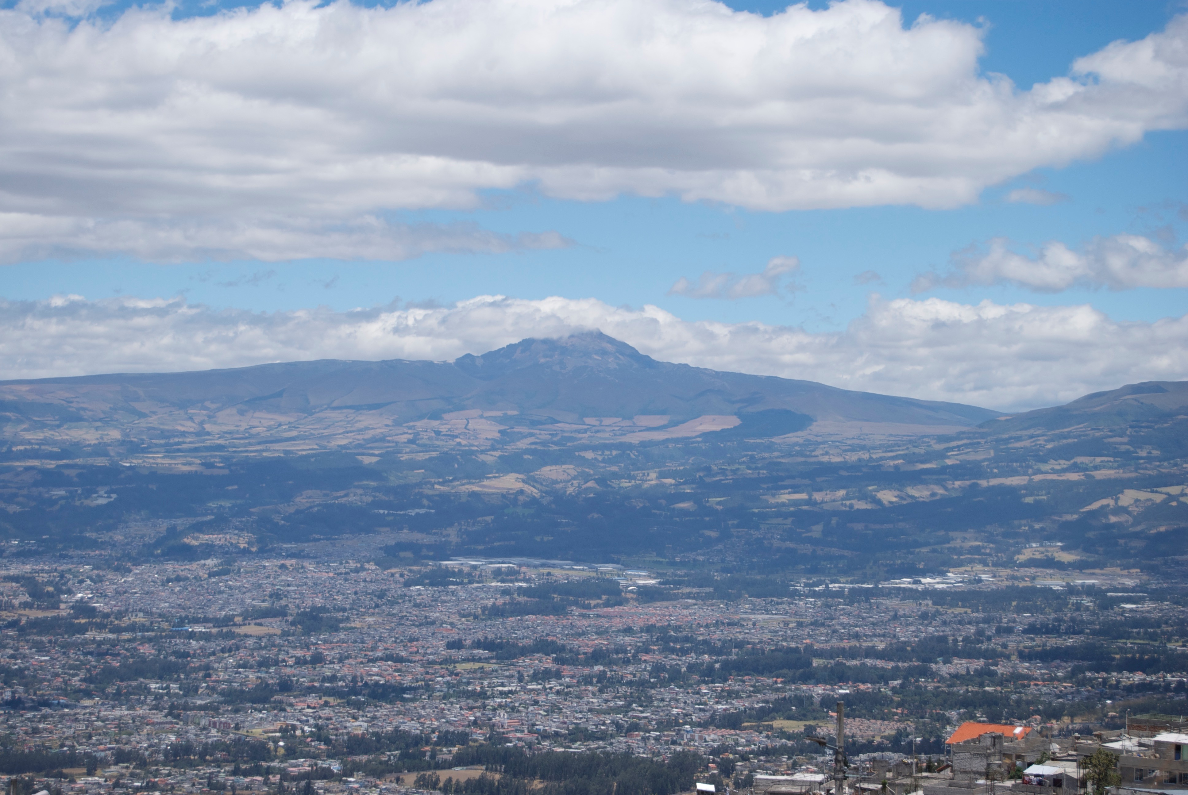 Foto tomada desde la Loma de Puengasí, en el barrio de San Isidro de Puengasi. Se ve la zona del Valle de los Chillos.